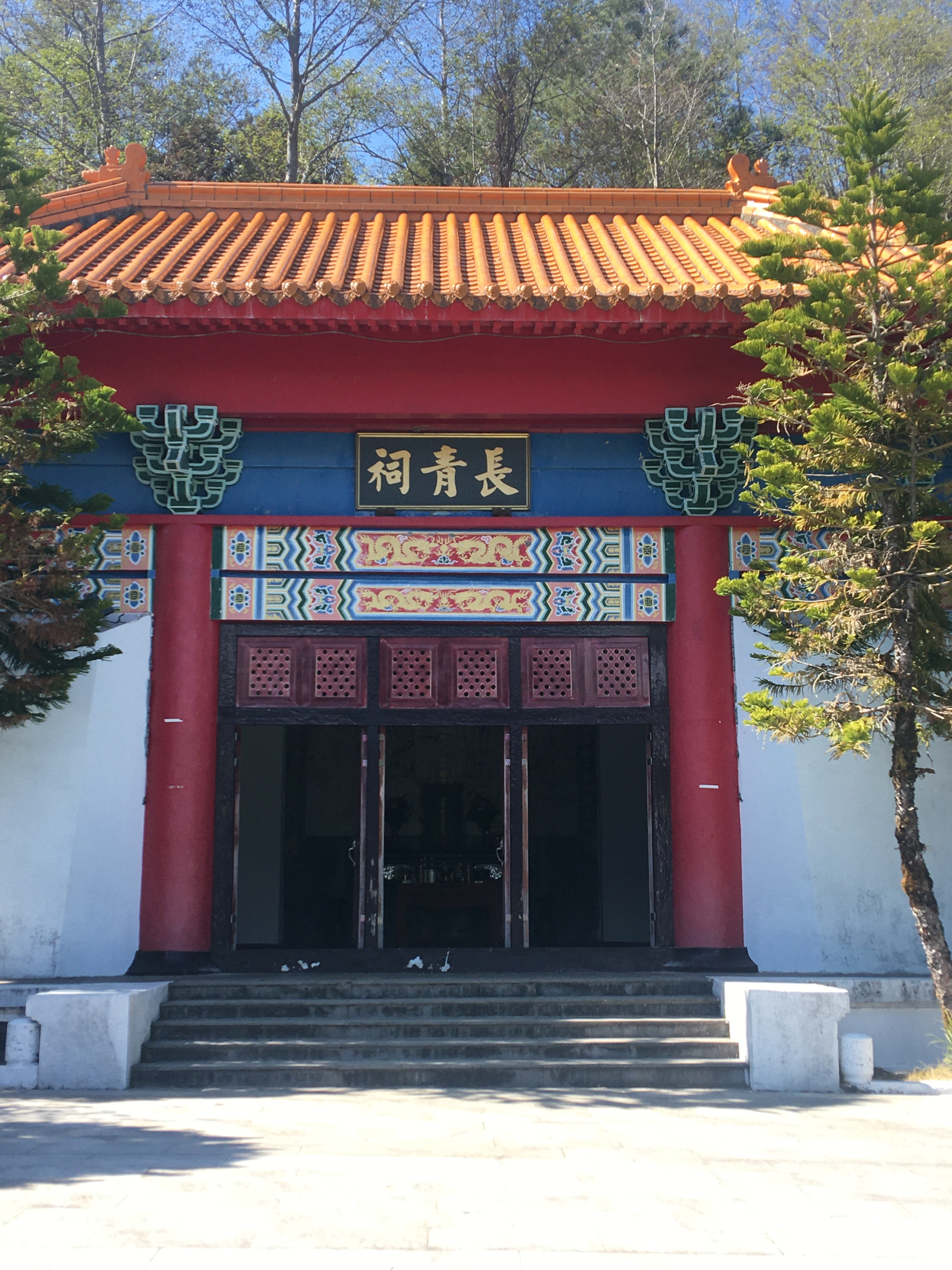 中文（台灣）: 臺灣南橫公路上的長青祠